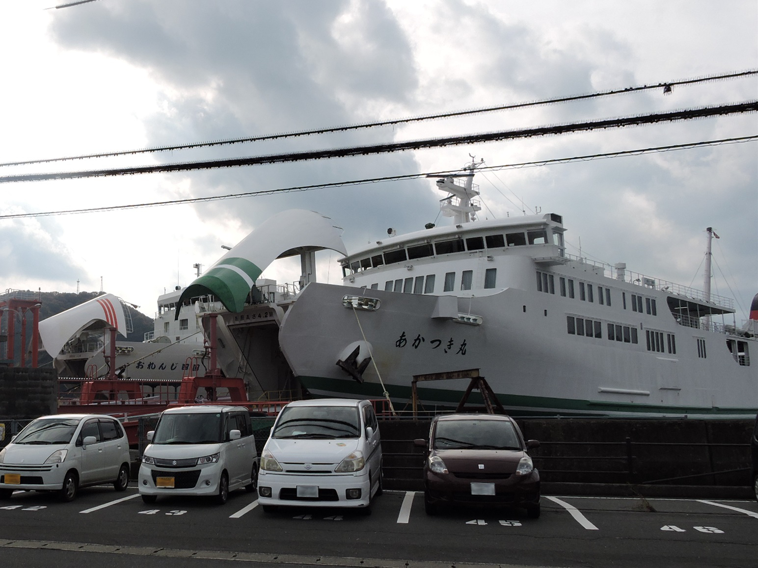 八幡浜フェリー乗り場には、八幡浜と臼杵・別府を結ぶ宇和島運輸フェリーと八幡浜と臼杵を結ぶ九四オレンジフェリーが運行しています。